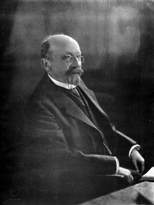 José Toribio Medina Zavala (Santiago; 21 de octubre de 1852 – 11 de diciembre de 1930) Bibliógrafo e Historiador chileno, el mayor recolector de fuentes para el estudio de la historia de su país.